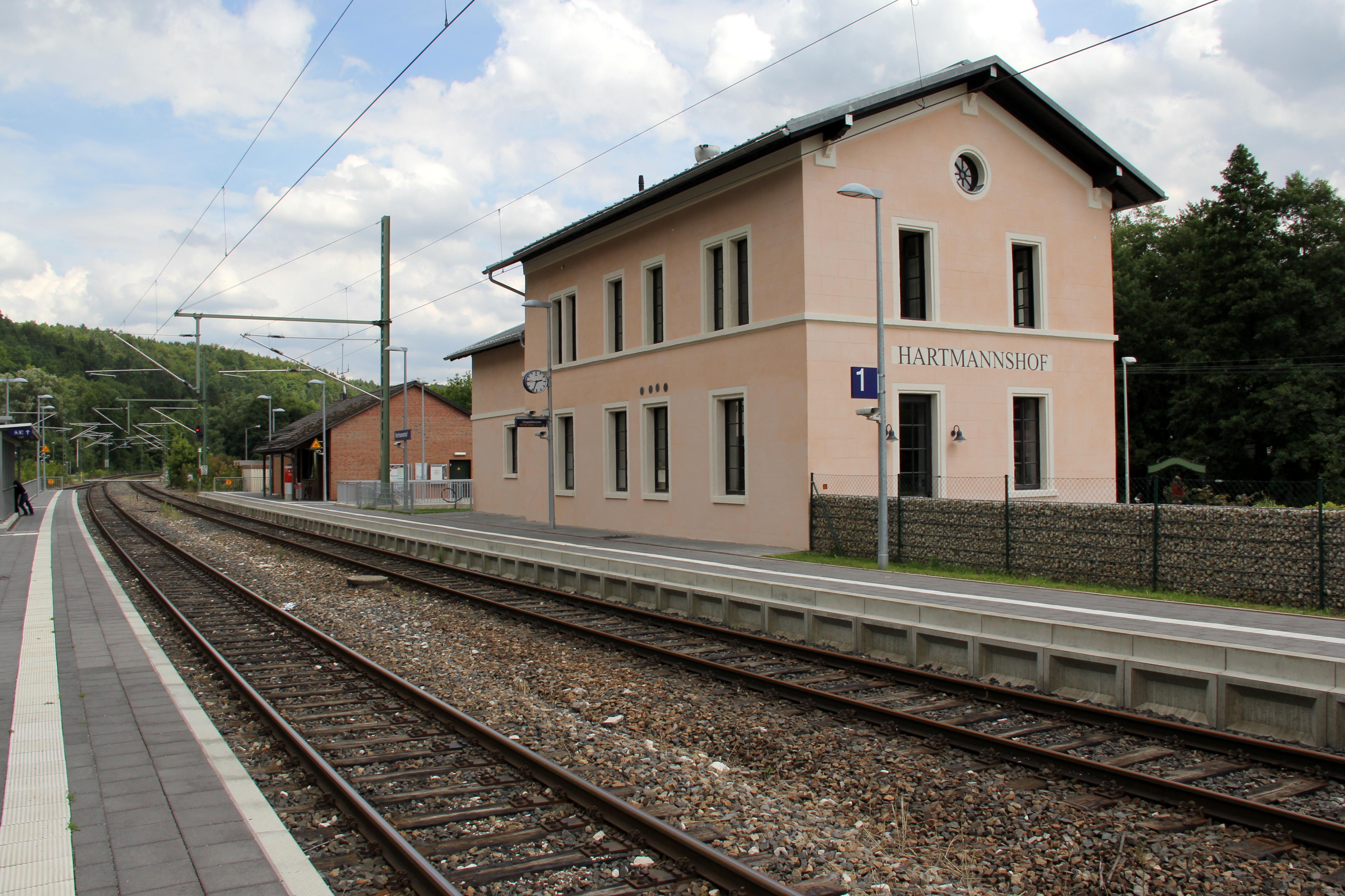 Hartmannshof, Bahnhof